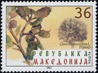 Quercus coccifera